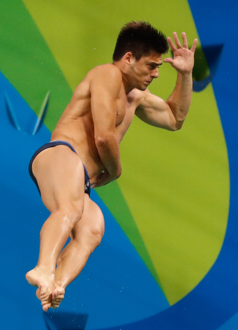 Rio de Janeiro - Britânicos Jack Laugher e Chris Mears é ouro no trampolim de 3 metros sincronizado dos saltos ornamentais nos Jogos Olímpicos Rio 2016, no Parque Aquático Maria Lenk (Fernando Frazão/Agência Brasil)